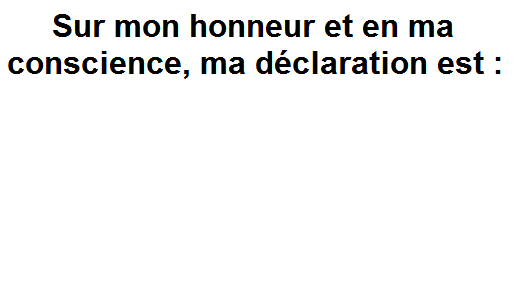 Reproduction d'un bulletin utilisé par les jurés de cour d'assises en République française